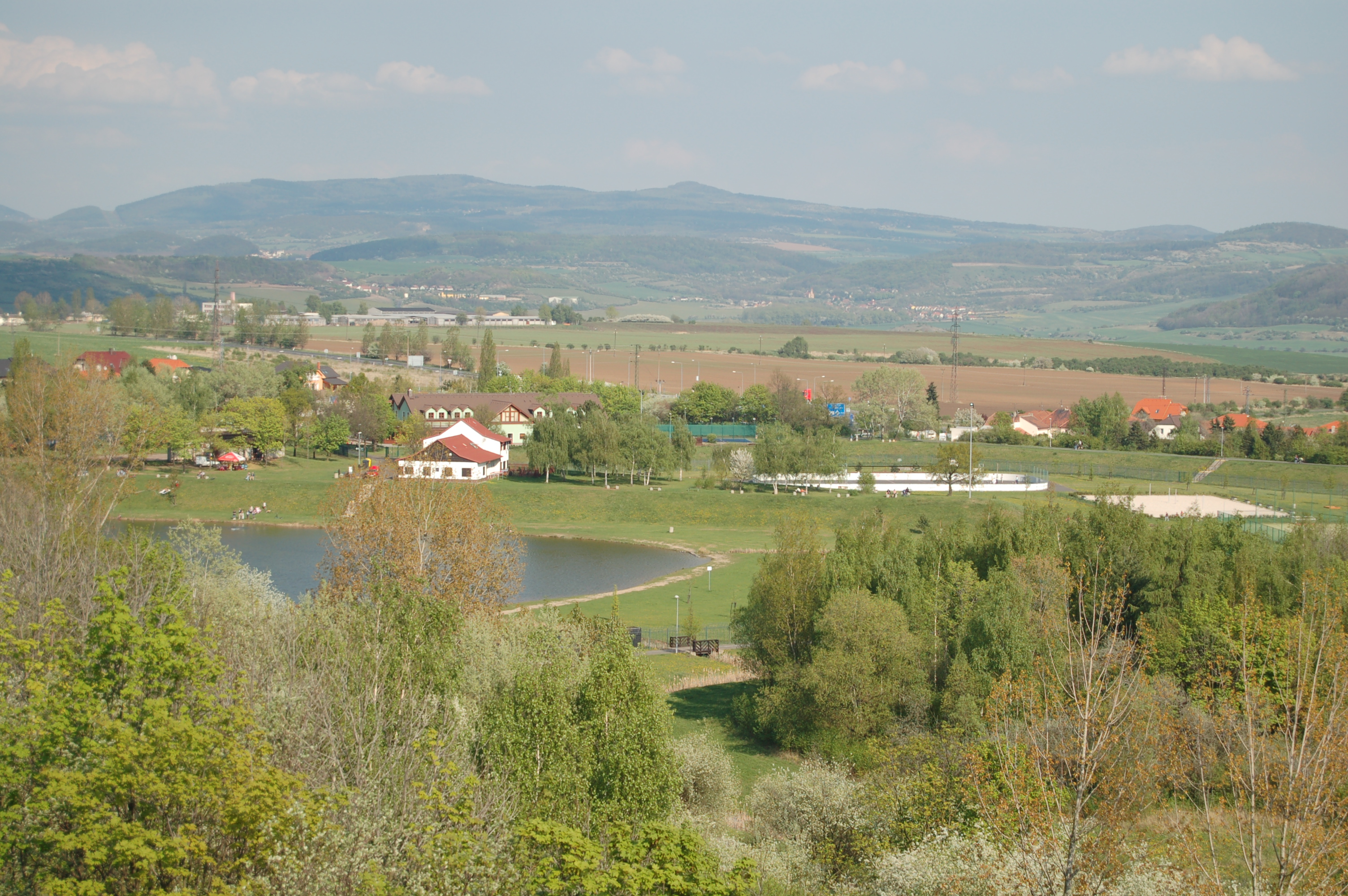 Vodní nádrž Benedikt u Mostu.